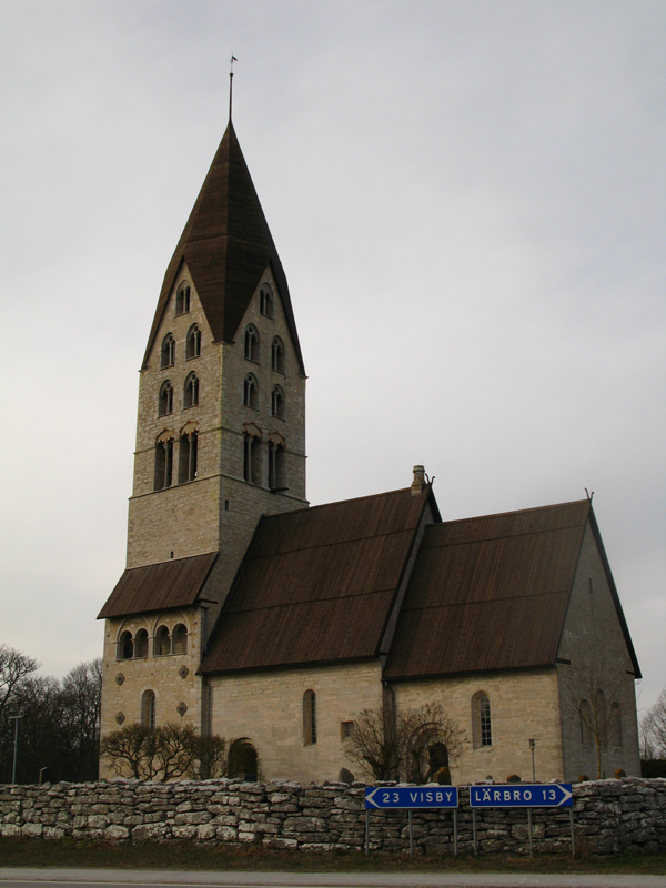 Tingstäde kyrka